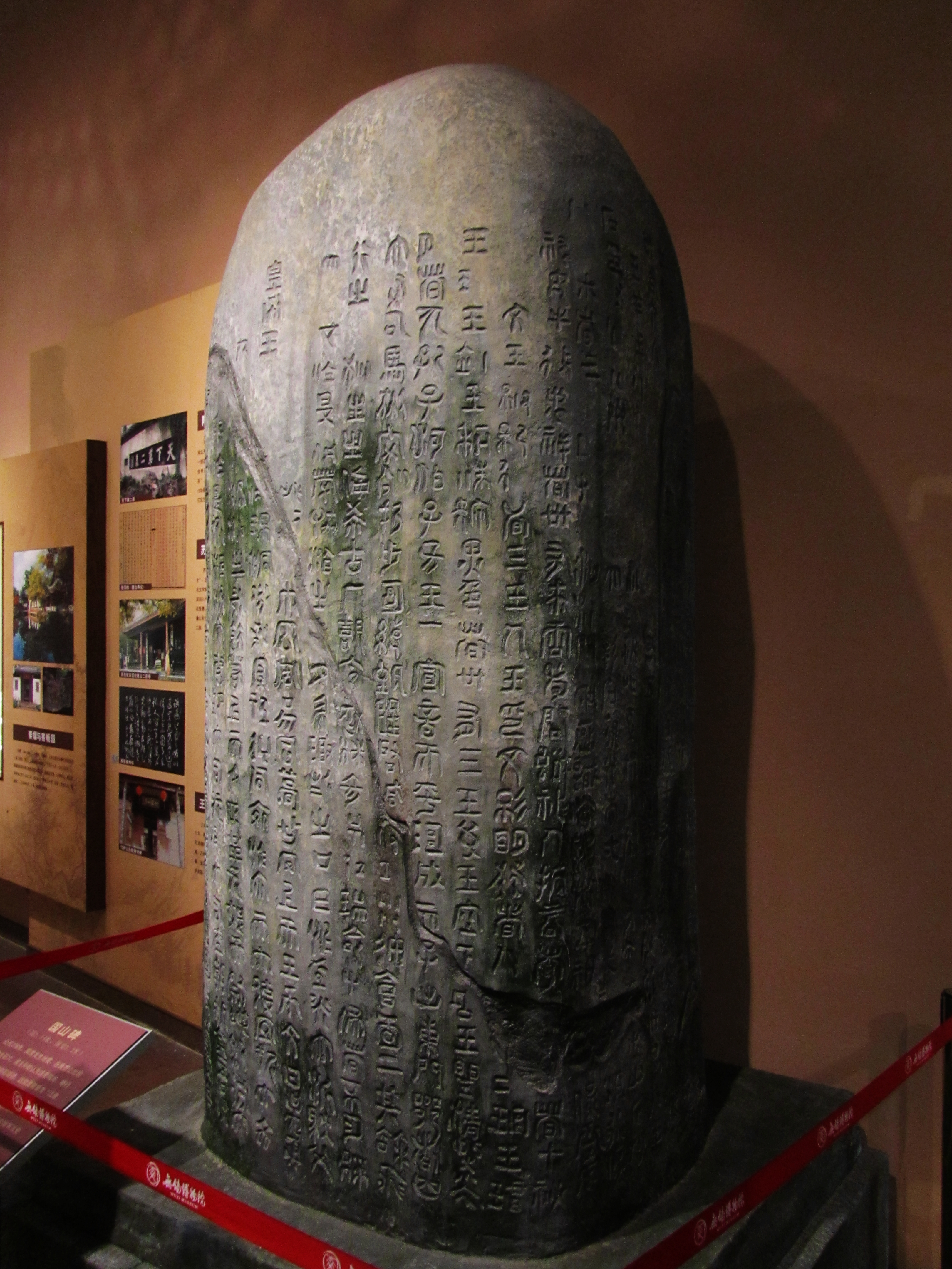 国山碑复制品，现藏无锡博物院。